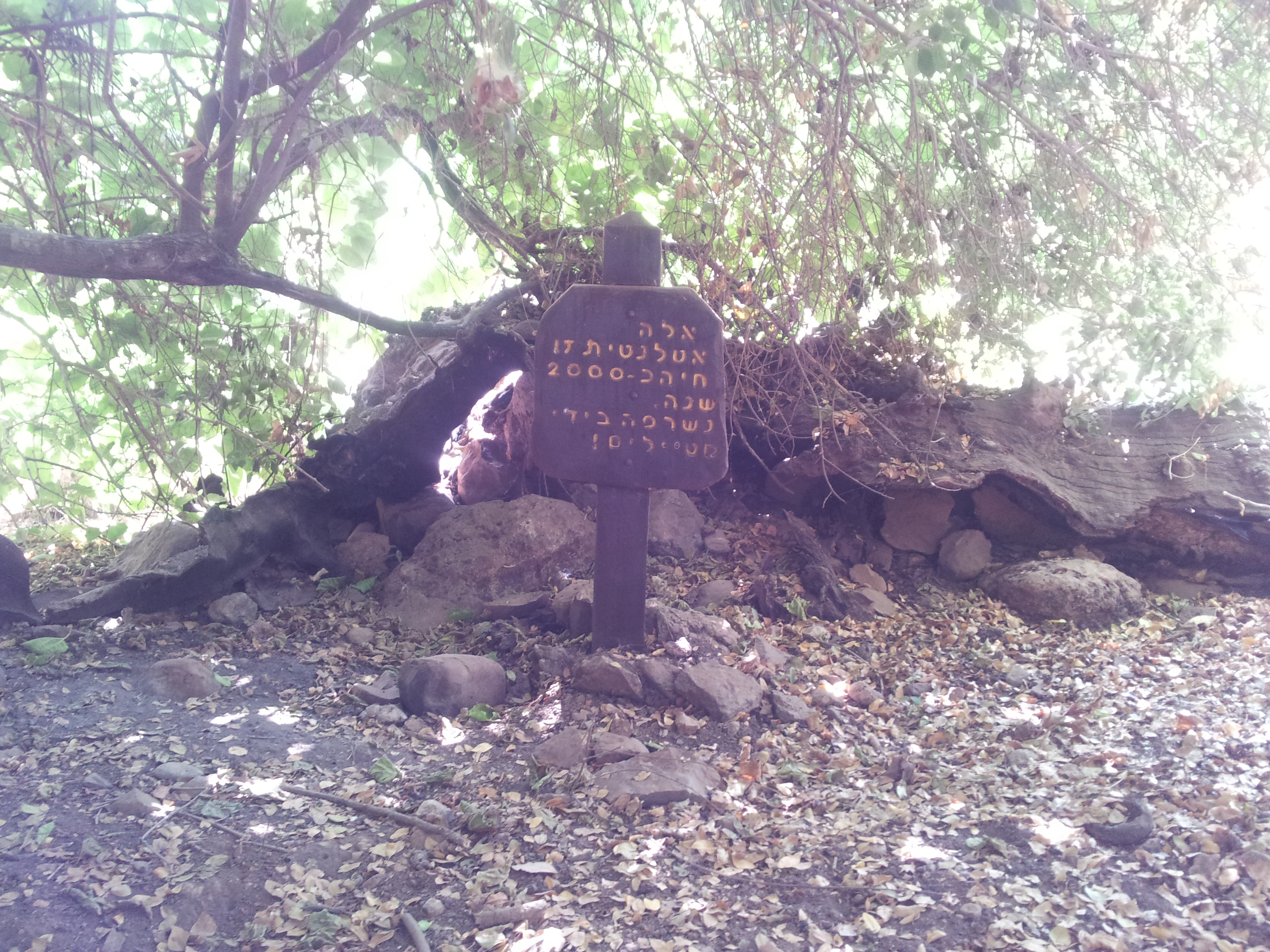 tel dan old tree